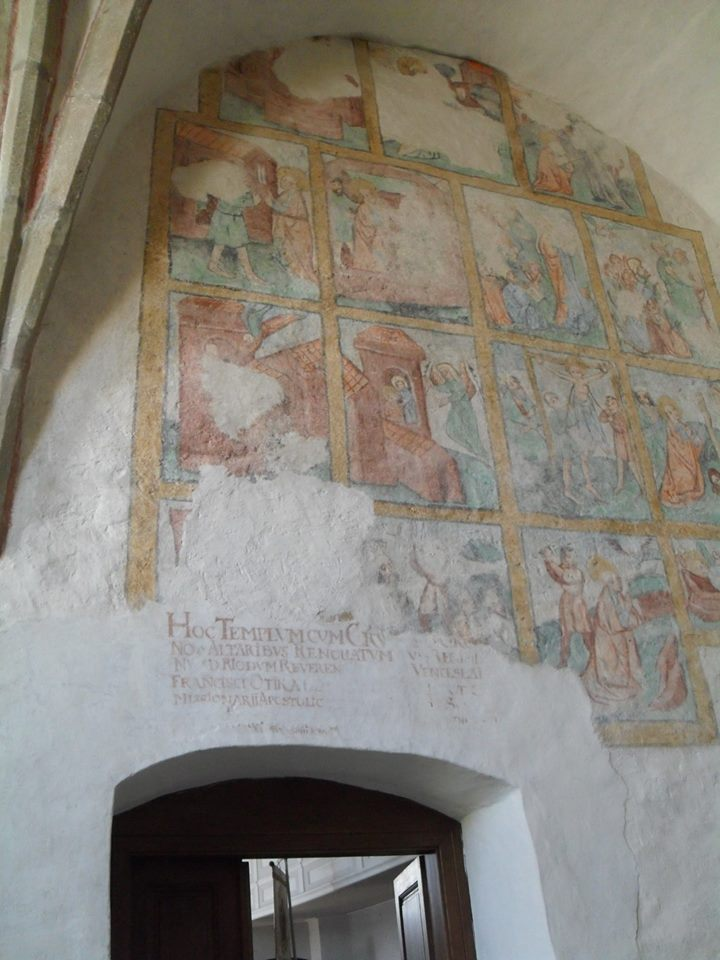 Freska umučení sv. Kateřiny v zámeckém kostele z poloviny 15. století jako památka na knížete Boleslava II.